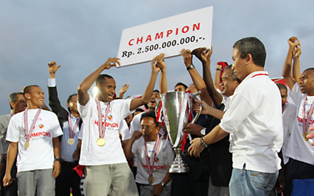 Perayaan juara Liga Prima Indonesia 2012, yang dimenang Semen Padang FC